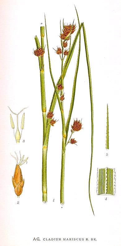 Cladium mariscus (L.) Pohl Original Description Ag, Cladium mariscus R. Br.